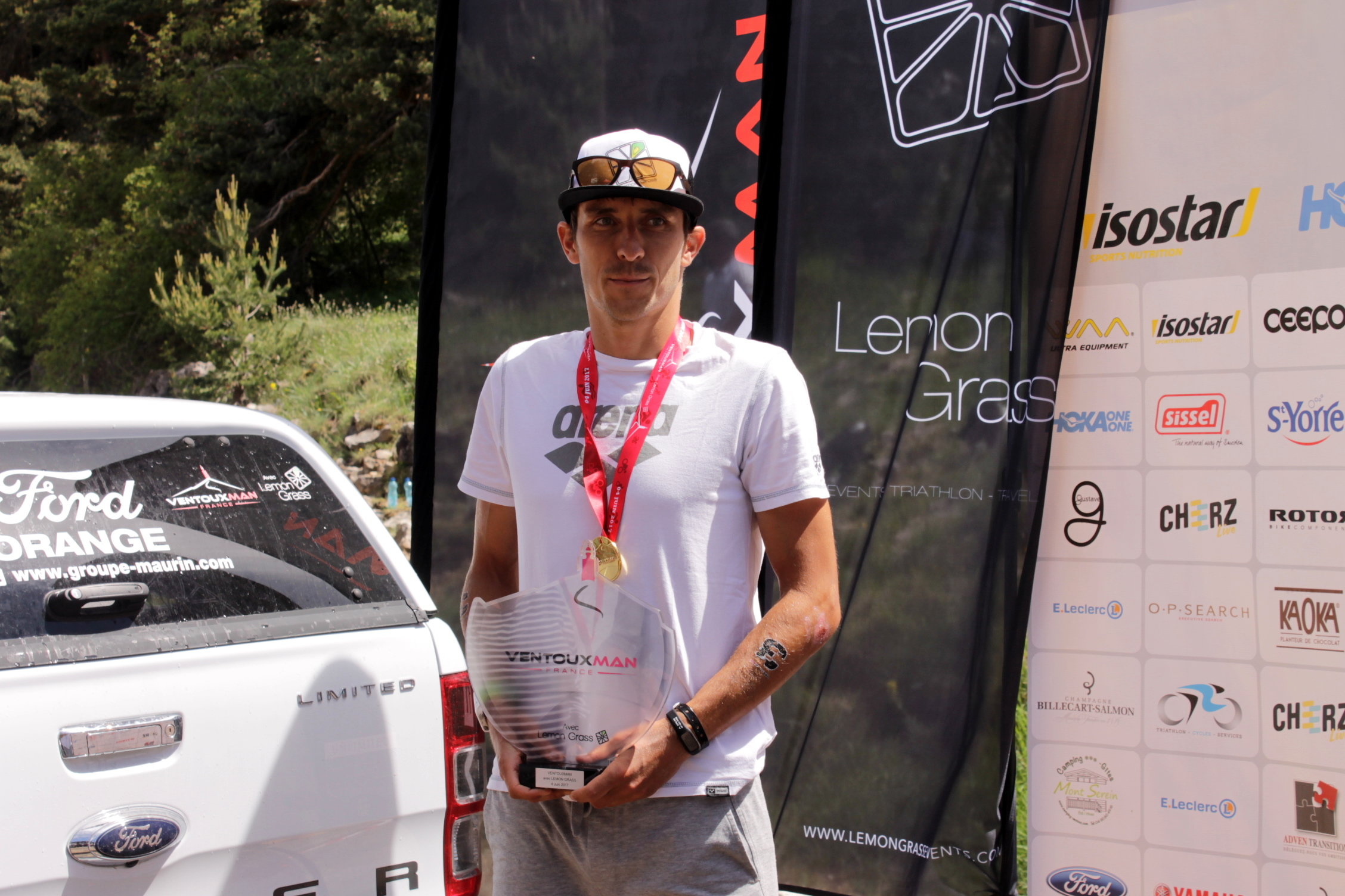 Christian Kramer Ventouxman 2017